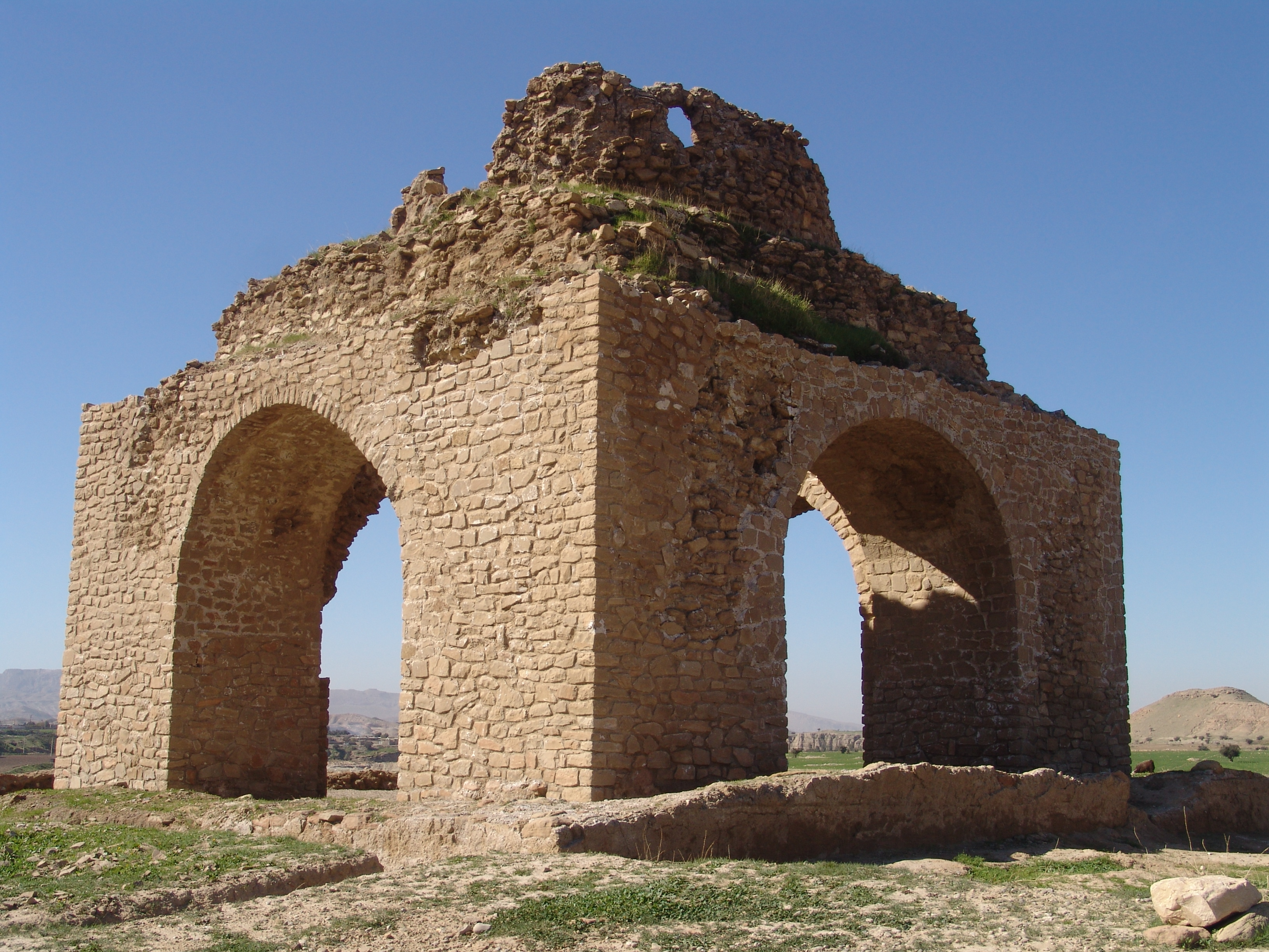 چهارطاقی خیرآباد در روستای خیرآباد، دهدشت